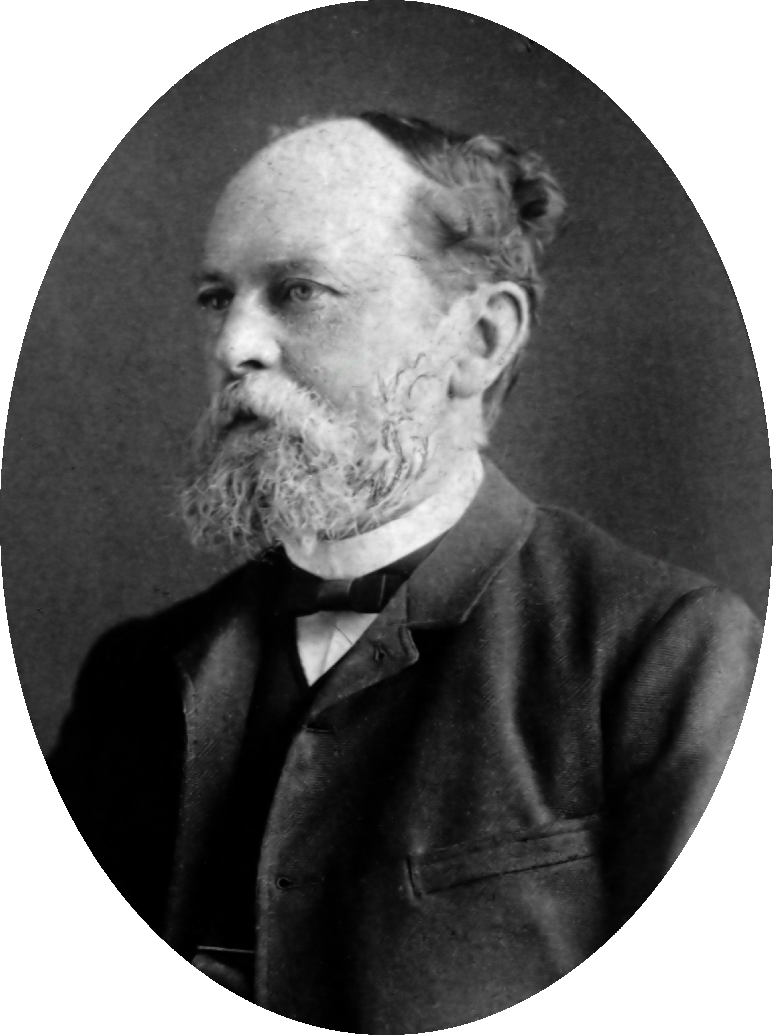 Kabinet Röell (1894-1897). S. van Houten, minister van Binnenlandse Zaken, van 9 mei 1894 tot 27 juli 1897